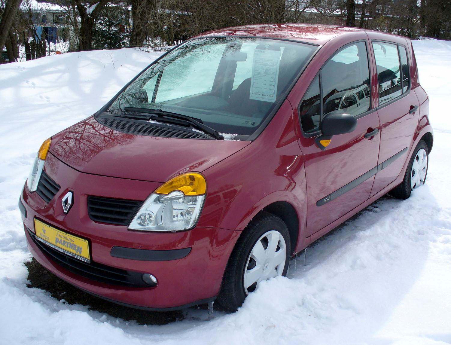 Renault Modus Phase I